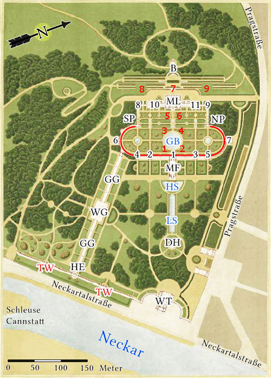 Ludwig von Zanth: Plan der Wilhelma von 1855 (Die Buchstabenkürzel und die Zahlen zur Bezeichnung von Gebäuden, Geländeteilen und Skulpturen wurden nachträglich eingefügt). Rote Linie = innerer Wandelgang, B = Belvedere, DH = Damaszenerhalle, GB = Großes Bassin, GG = Gewächshausgang, HE = Haupteingang, HS = Halbmondsee, LS = Langer See, MF = Maurischer Festsaal (heute Aquarium-Terrarium), ML = Maurisches Landhaus, NP = Nördlicher Pavillon, SP = Südlicher Pavillon, TW = äußerer Wandelgang mit der Terrakottawand, WG = Wintergarten, WT = Wilhelma-Theater Schwarze Ziffern = Innerer Wandelgang 1 = Hauptpavillon des inneren Wandelgangs, 2/3 = Nebenpavillons, axial zu den Eckpavillons der Gewächshausflügel, 4/5 = Nebenpavillons, axial zu den Pavillons SP bzw. NP, 6/7 = Bogenpavillons, 8/9 = Eckkioske der Laubengänge, 10/11 = Eckpavillons der Gewächshausflügel. Rote Ziffern = Tiergruppen von Albert Güldenstein 1 = Zwei Gazellen, 2 = Löwe, 3 = Hyäne mit Lamm, 4 = Tiger mit Schlange, 5 = Panther mit Gazelle, 6 = Löwe mit Stier?, 7 = Wölfe mit Hirsch, 8 = Bärenhatz, 9 = Schweinehatz